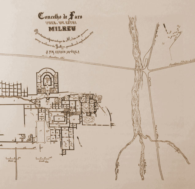 Planskizze Milreu